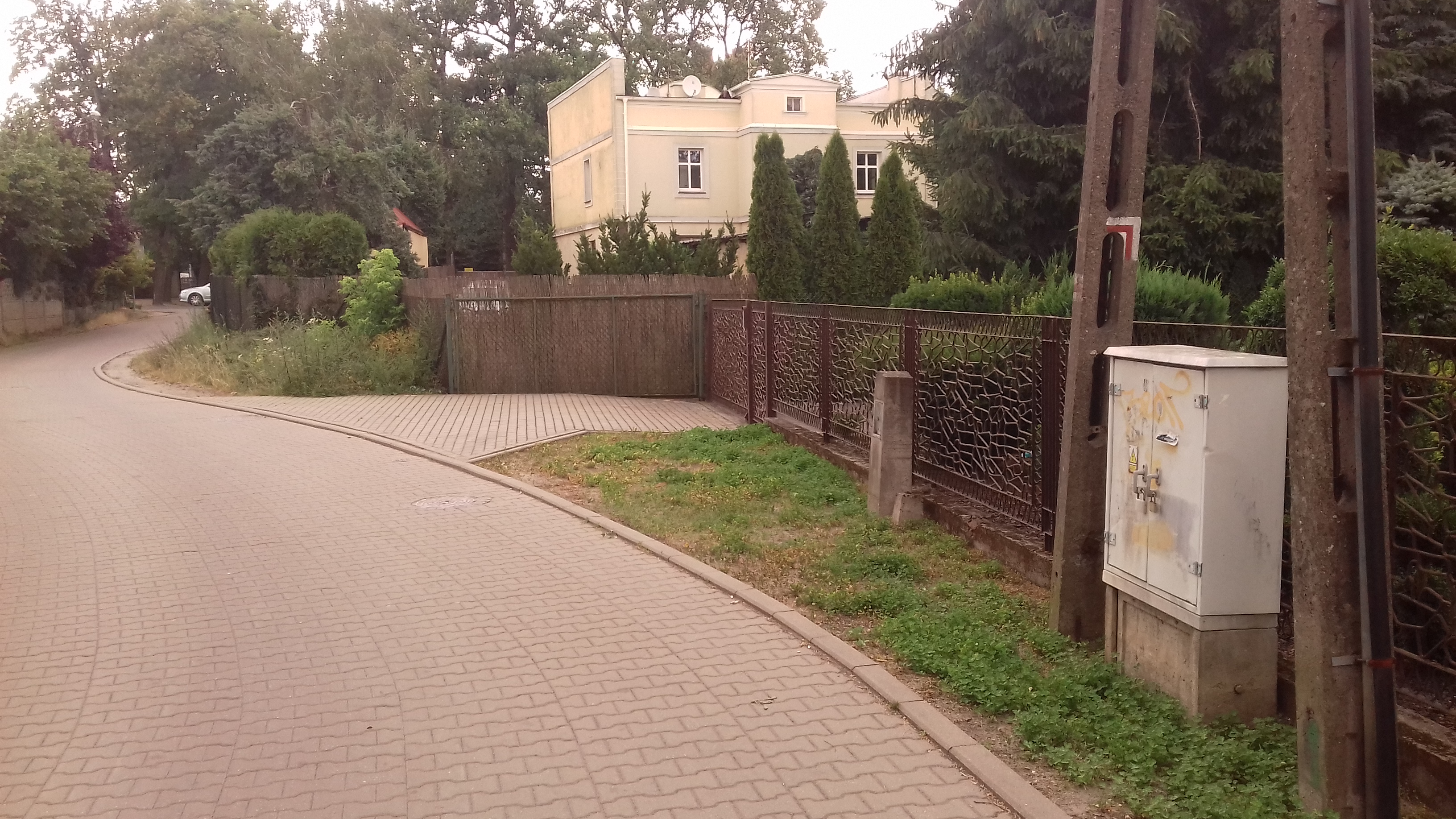 Oznaczenie szlaku pieszego nr 186 (czerwonego) w Puszczykówku na odcinku PKP Puszczykówko - Niwka (ul. Śląska).